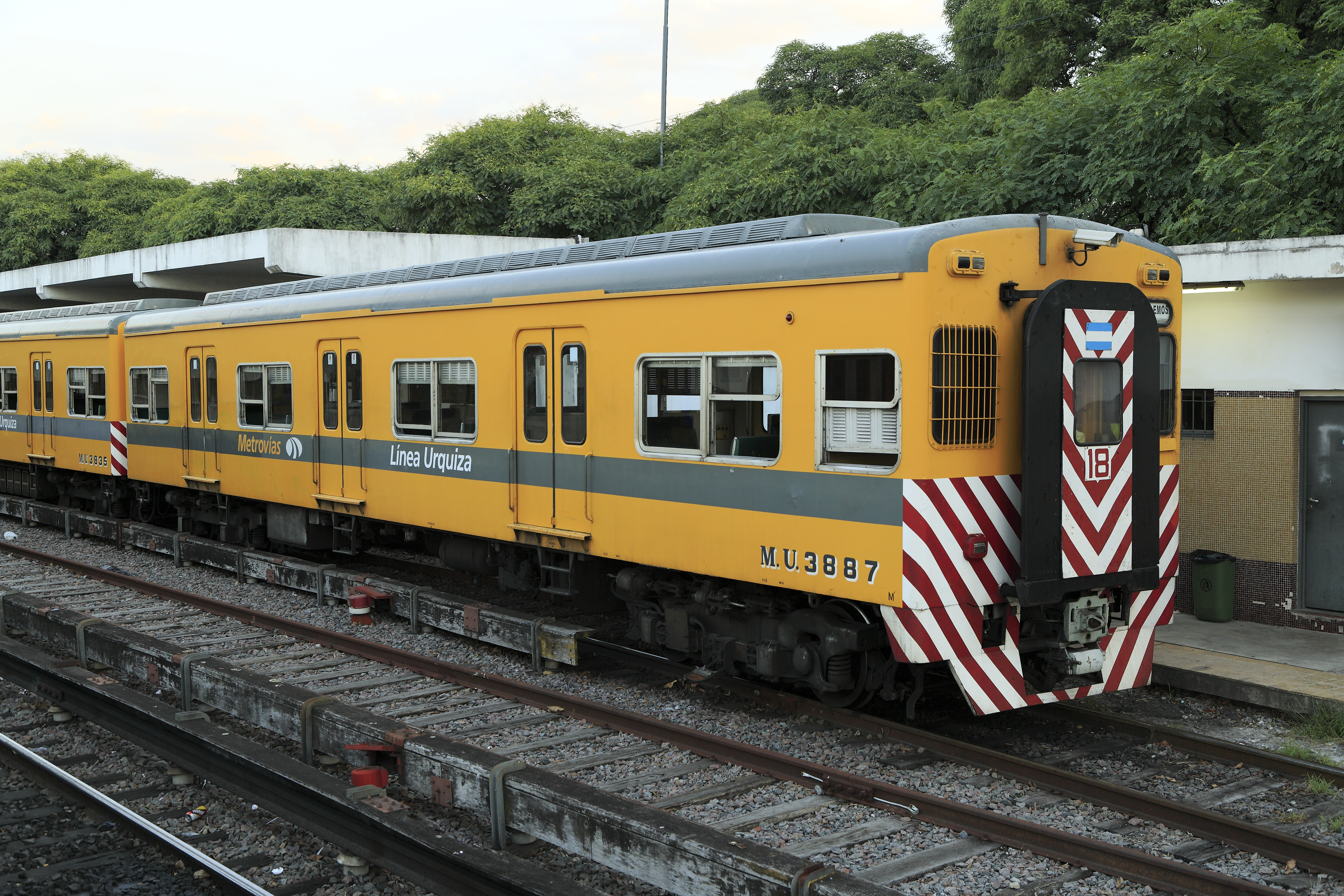 Ganz links gibt es zwar einen Bahnsteig, doch der wurde nicht erhöht. Damit sind die beiden Gleise ganz links nur Abstellgleise.Die Toshiba-Doppeltriebwagen verkehren hier in der Regel in festen Sechswageneinheiten, obwohl sie einzeln fahrbar sind. Nur die Führerstände an den Zugenden sind voll ausgerüstet und werden in vollem Umfang unterhalten. Die Führerstände sind so abschließbar, dass nur der Raum hinter dem in Fahrtrichtung linken Stirnwandfenster mit Fahrschalter, Führerbremsventil und der zusätzlichen Seitentür geschlossen und der Wagenübergang benutzbar ist. Einheit 18, die Nummern der Einzelwagen oder der Doppeltriebwagen sind nicht fortlaufend.